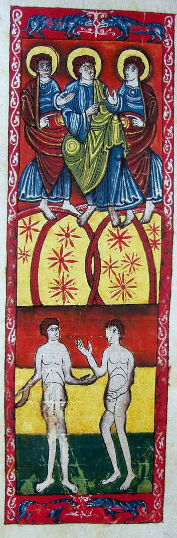 Beato de San Millán